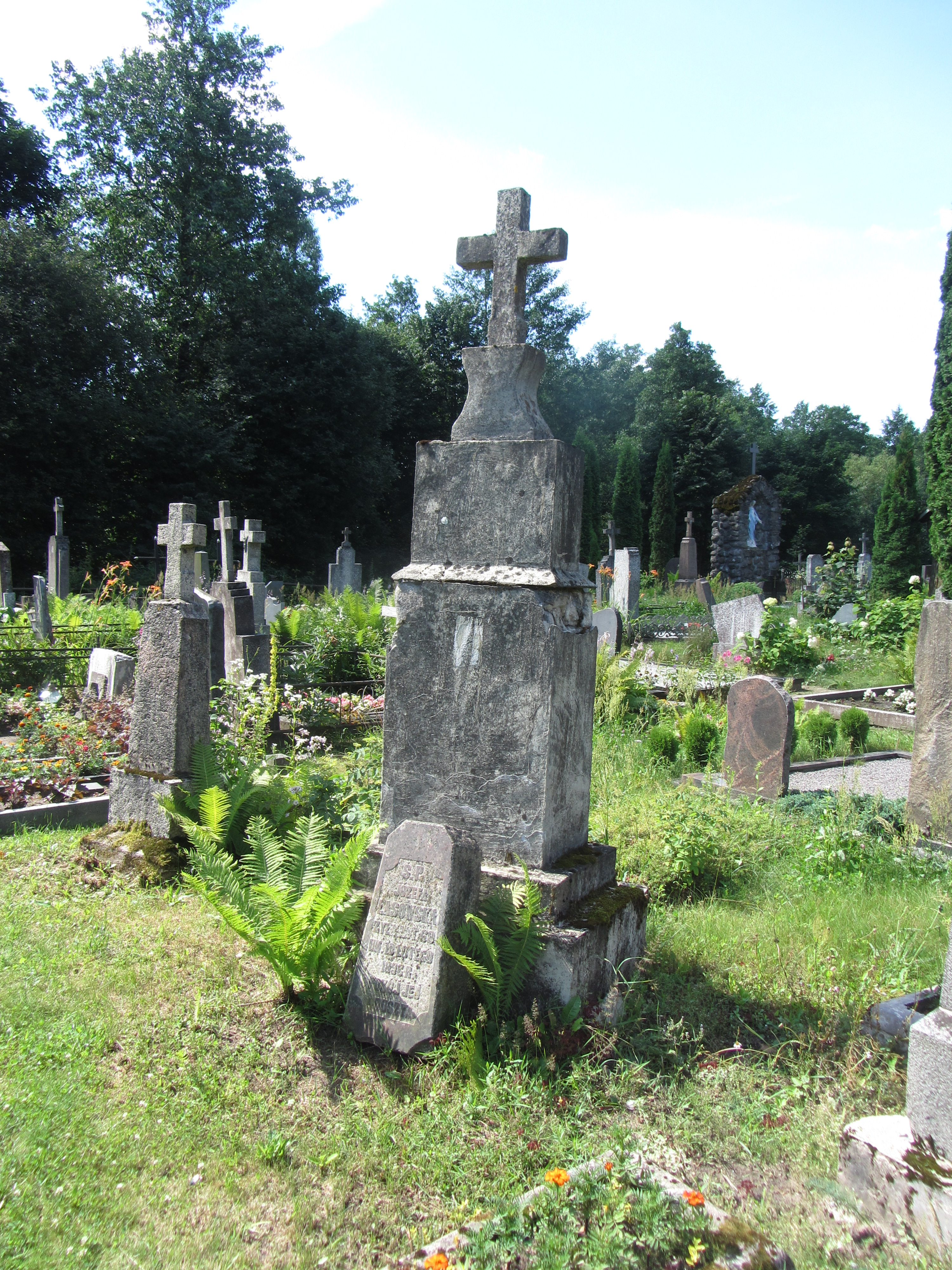 Užuperkasis, Lithuania